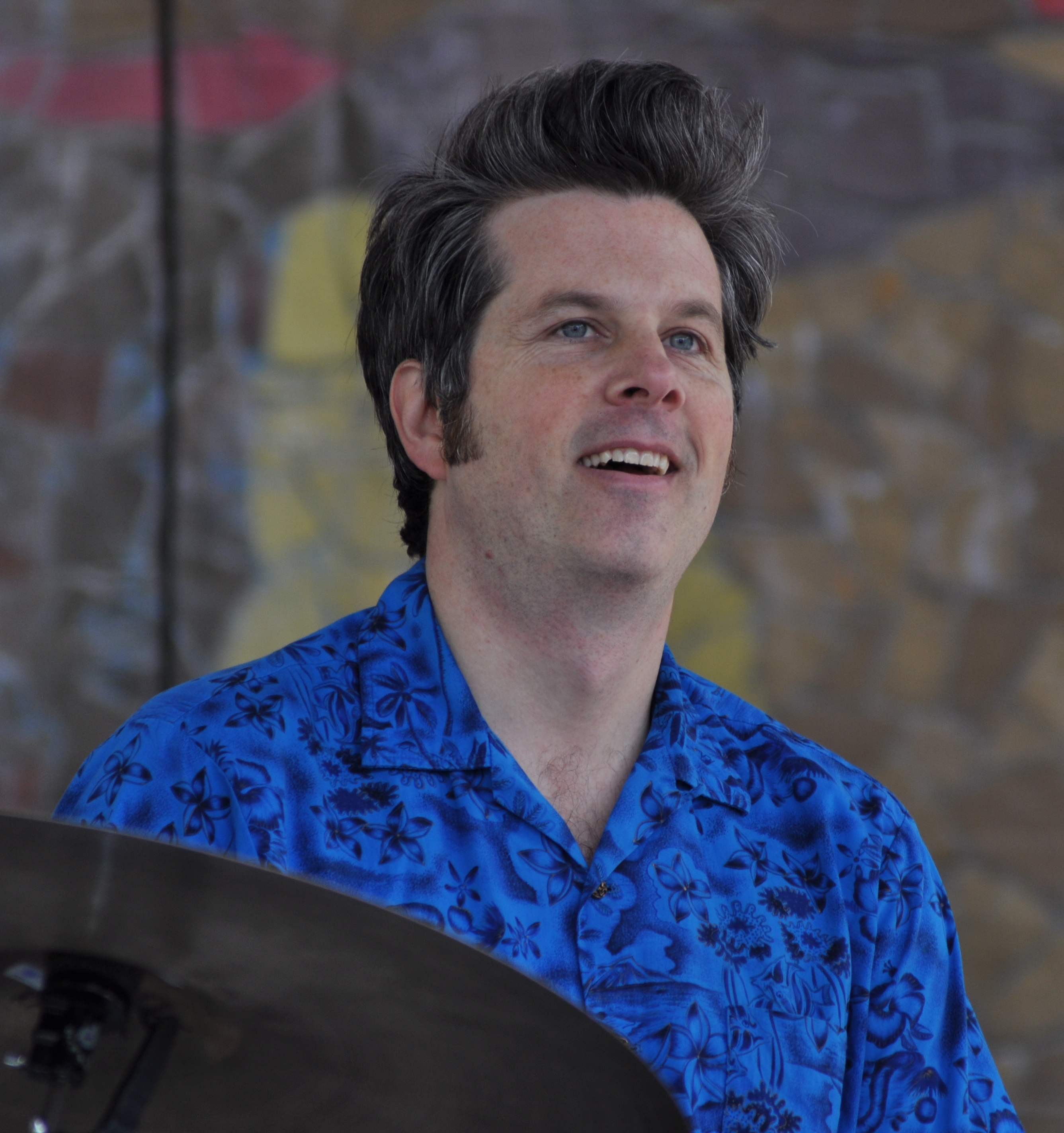 Марк Пикерел, барабанщик Screaming Trees